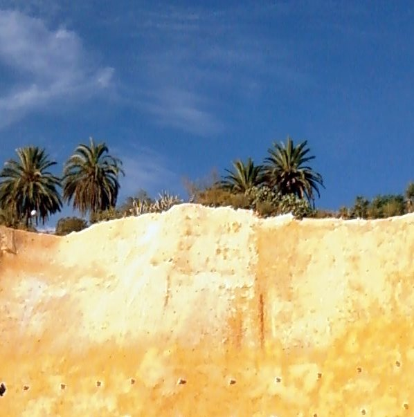 Respiradero del acueducto subterráneo romano de Huelva (España).